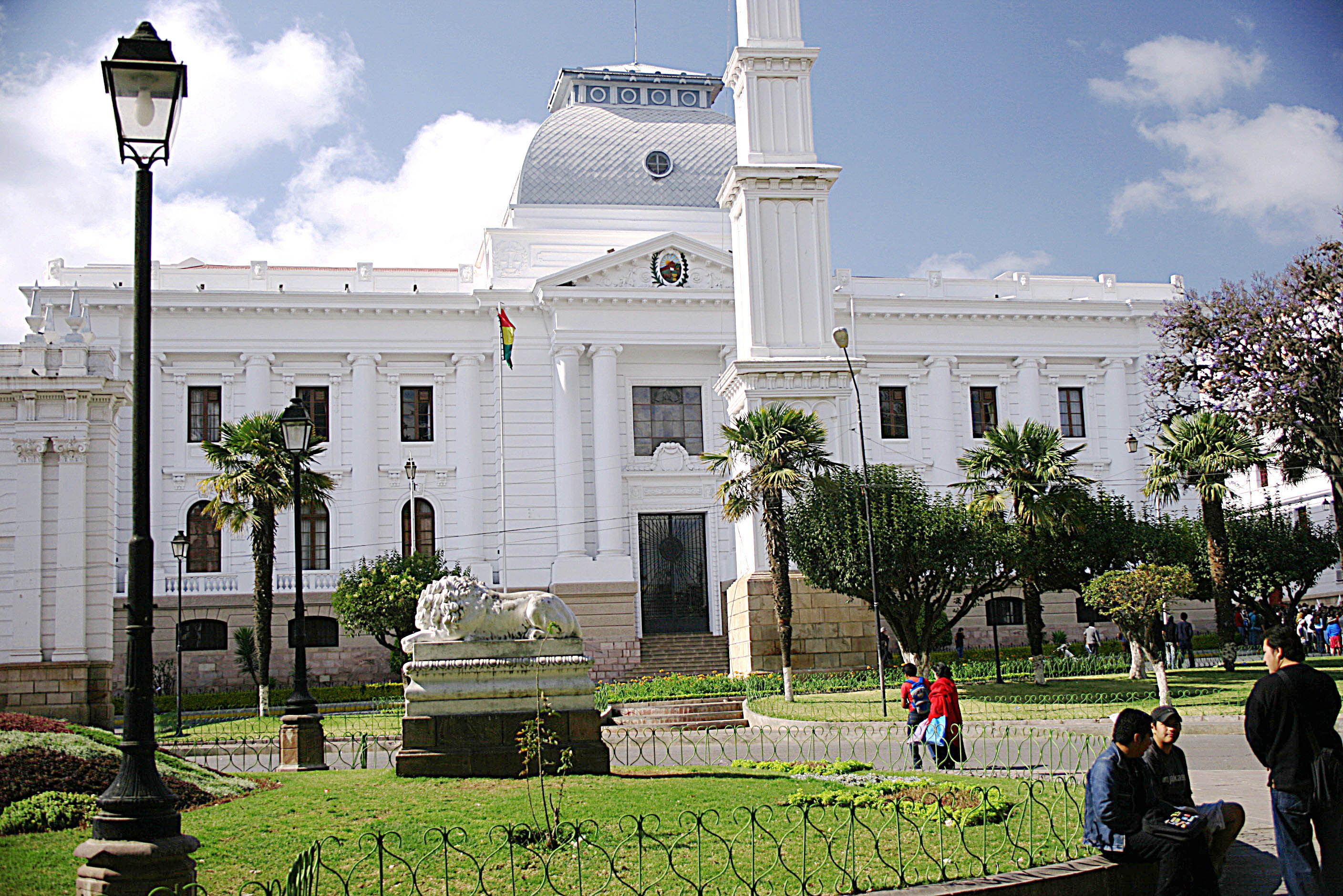 Para mim esta é a cidade mais bonita da Bolivia. Deu até vontade morar lá!